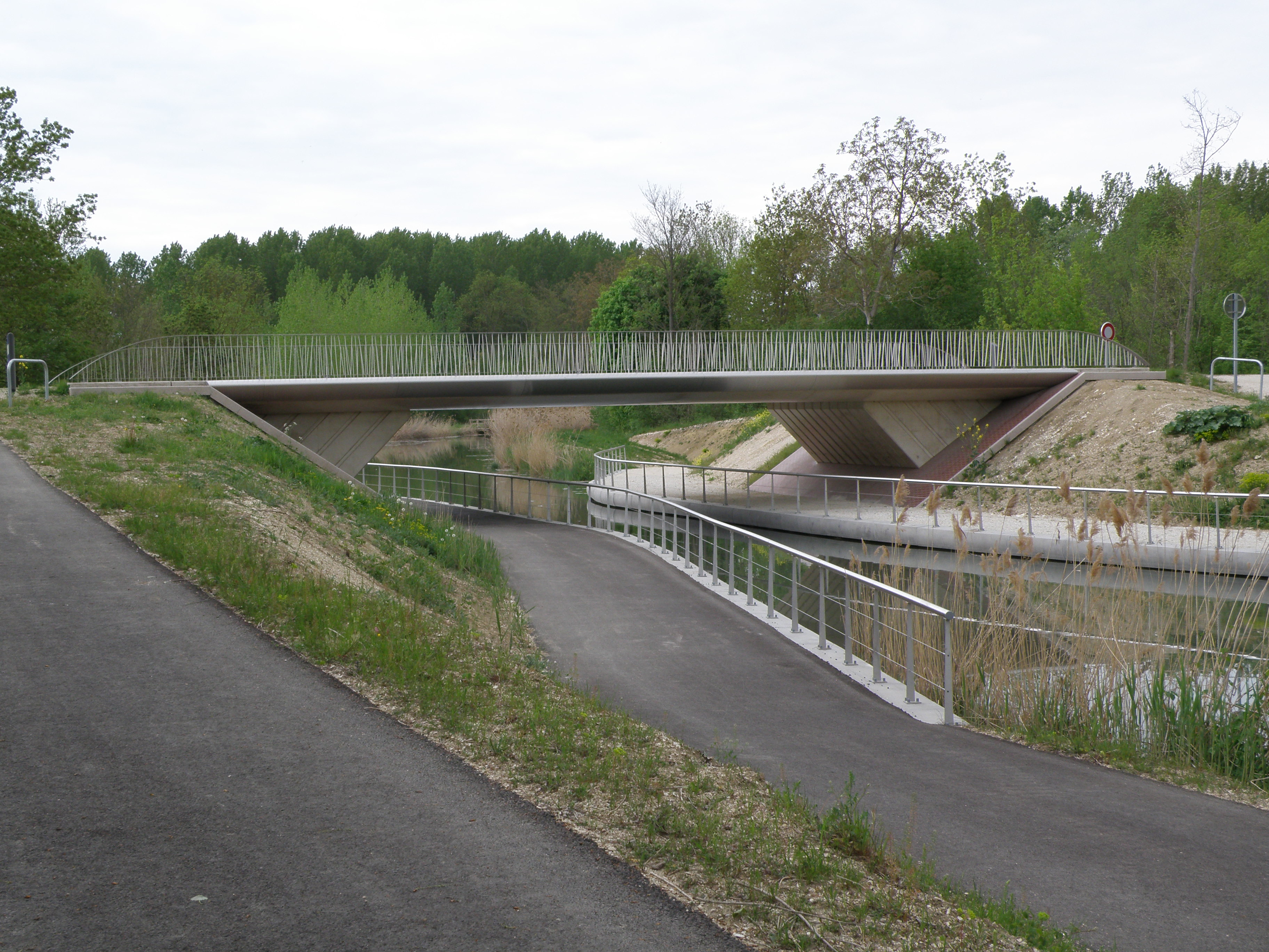 Pont sur le canal de la Haute-Seine. 10170 Vallant-Saint-Georges.